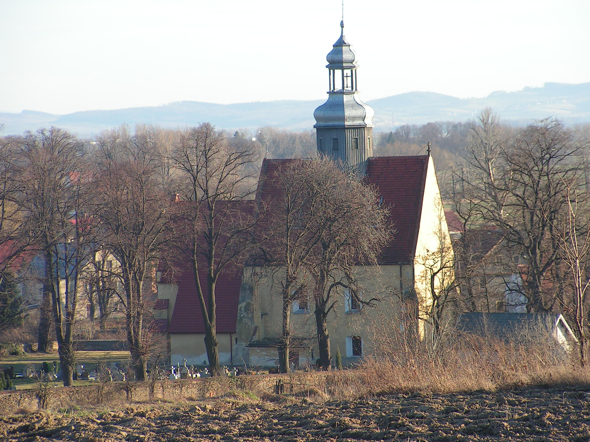 Mościsko - rzymskokatolicki kościół filialny p.w. św. Jana Chrzciciela, XIV, XX